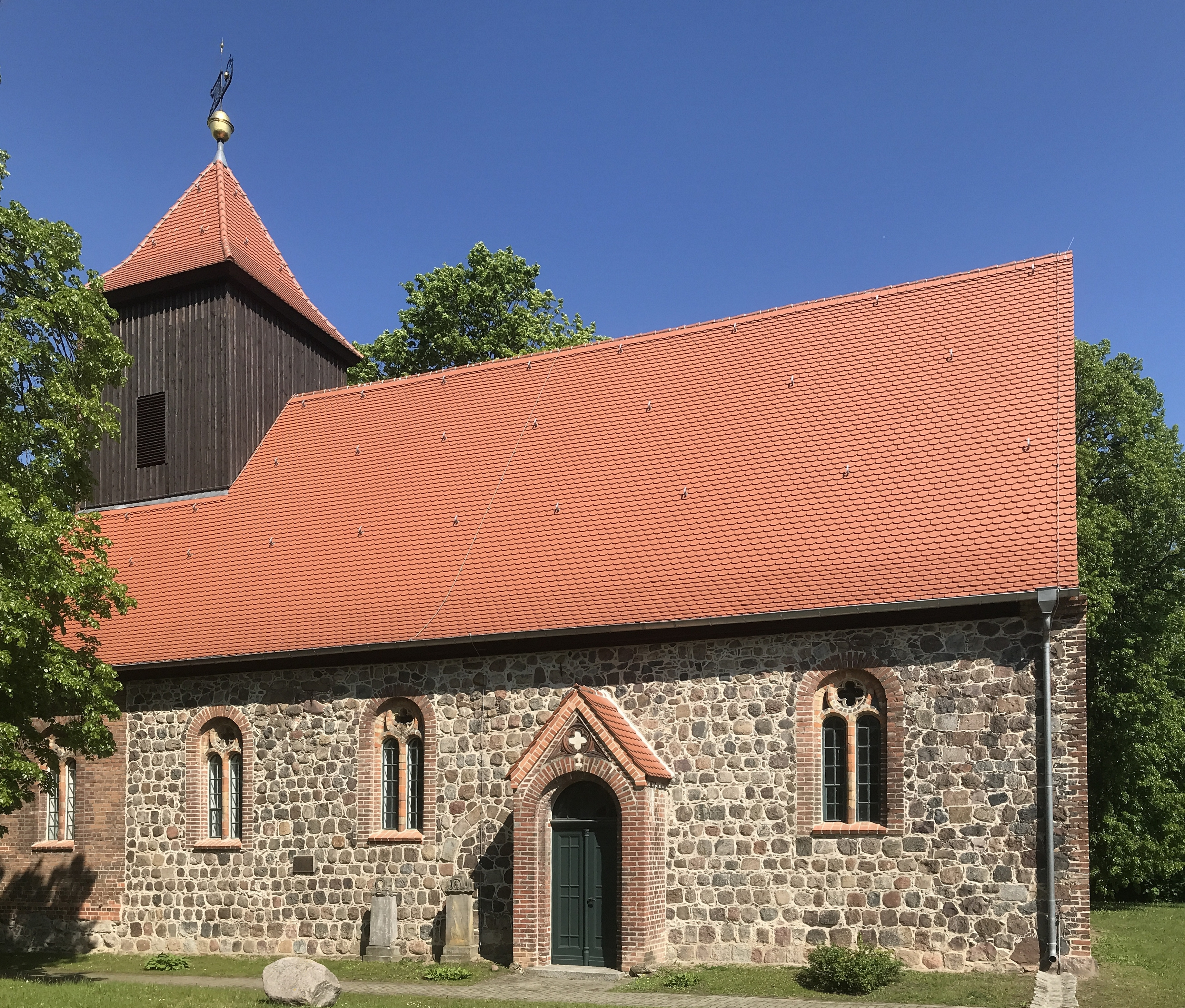 Die Dorfkirche Jacobsdorf in der gleichnamigen Gemeinde im Landkreis Oder-Spree ist eine Feldsteinkirche aus dem 13. Jahrhundert. Im Turm hängen zwei Glocken aus dem 14. Jahrhundert sowie aus dem Jahr 1580.